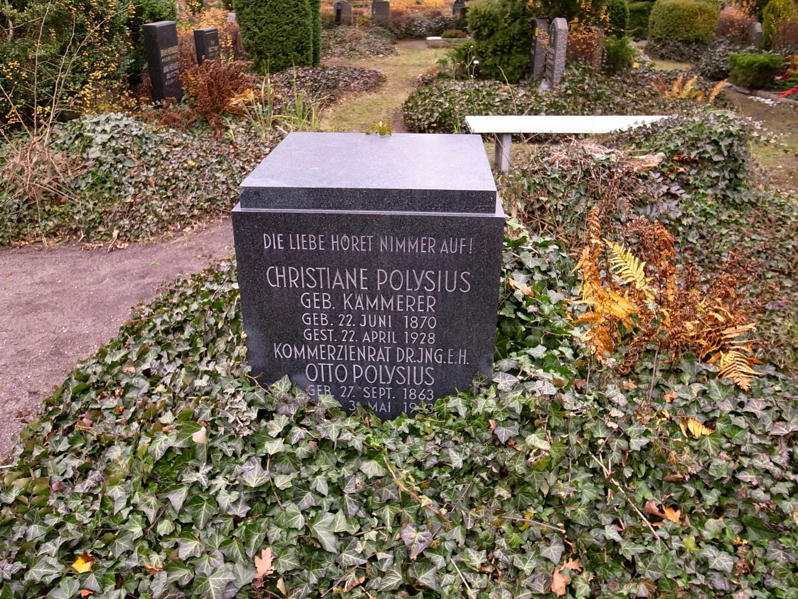 Ruhestätte von Christiane und Otto Polysius auf dem Friedhof I (Historischer Friedhof) in Dessau